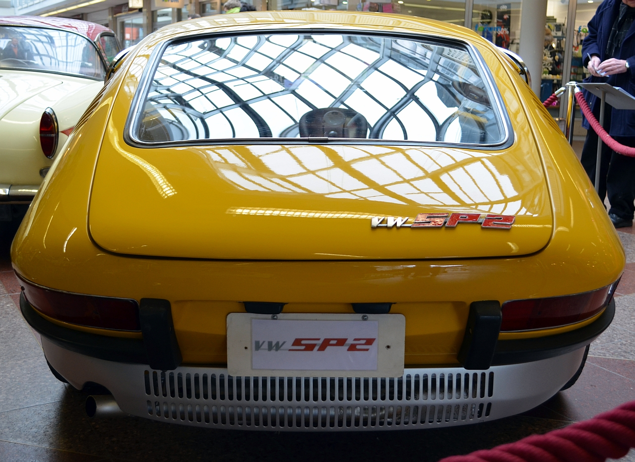 VW SP2